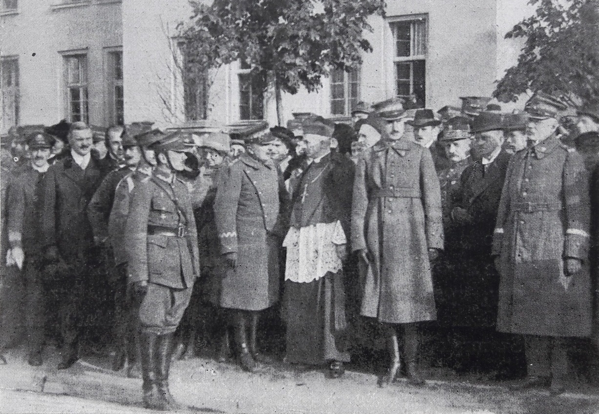 Uroczystość poświęcenia gmachu szkolnego Wielkopolskiej Szkoły Podchorążych Piechoty w Bydgoszczy. Minister Spraw Wojskowych gen. Kazimierz Sosnkowski z grupą gości przed defiladą.